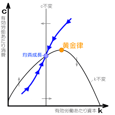 最適成長と黄金律